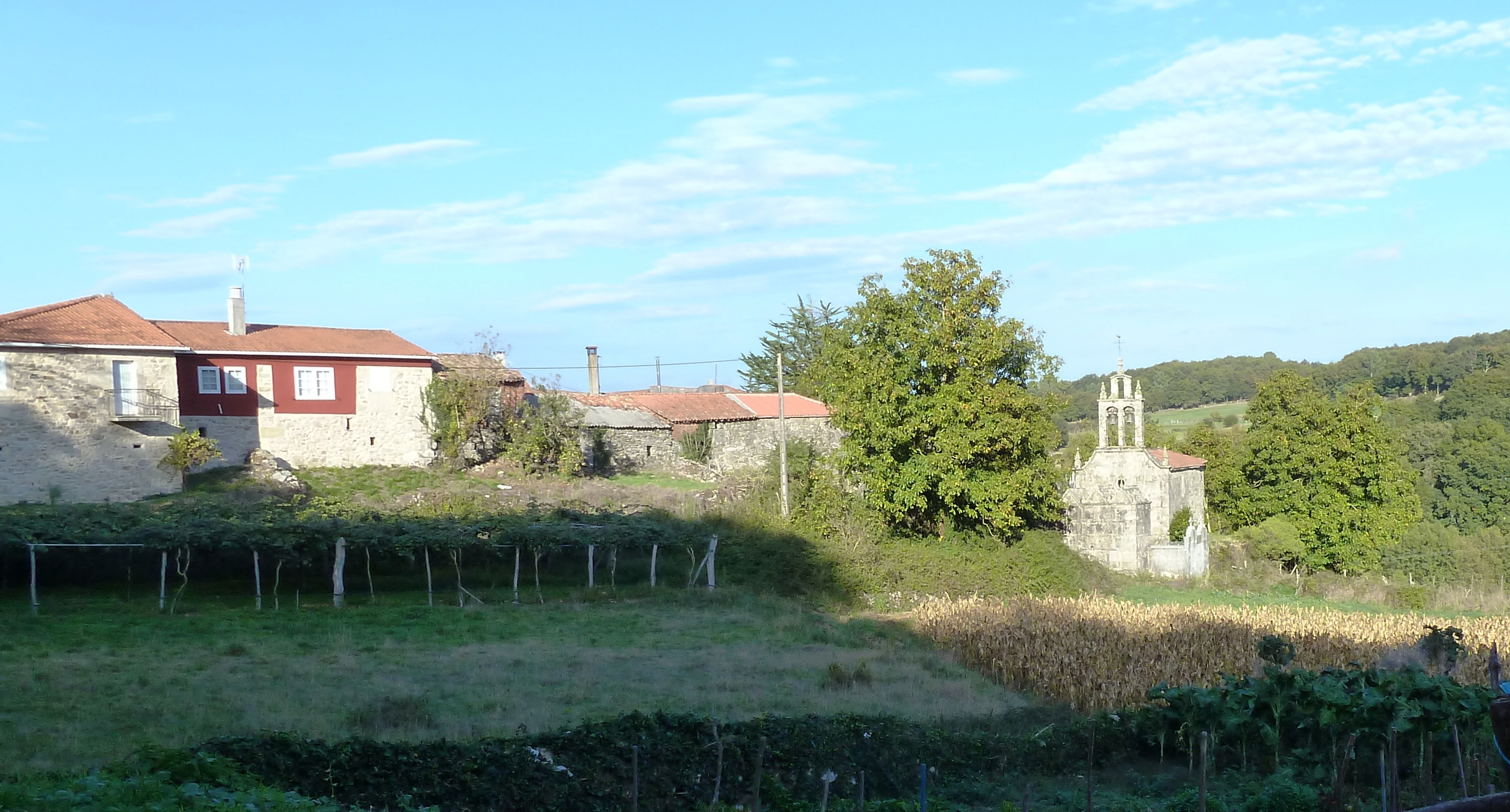 Santa Mariña, Carballedo